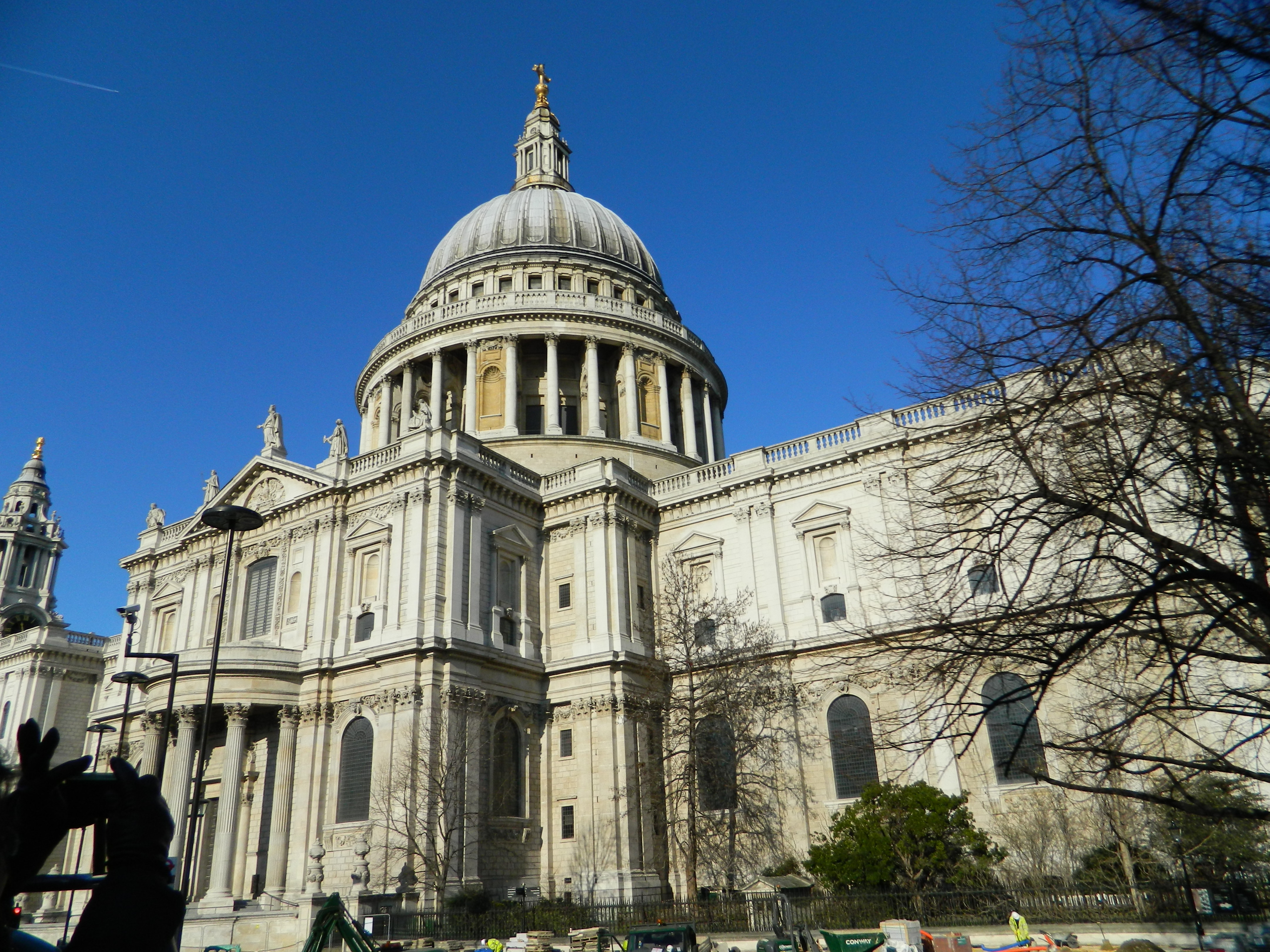 London